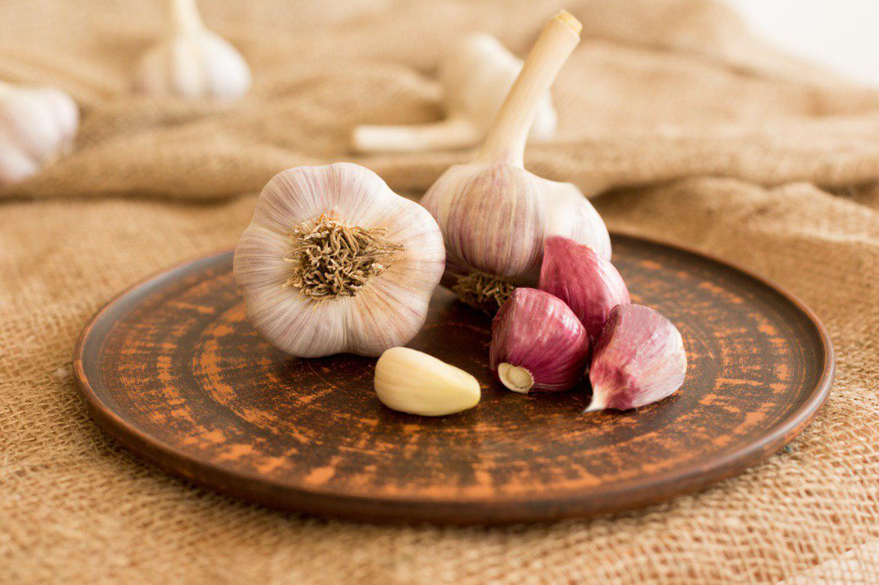 Луковицы чеснока